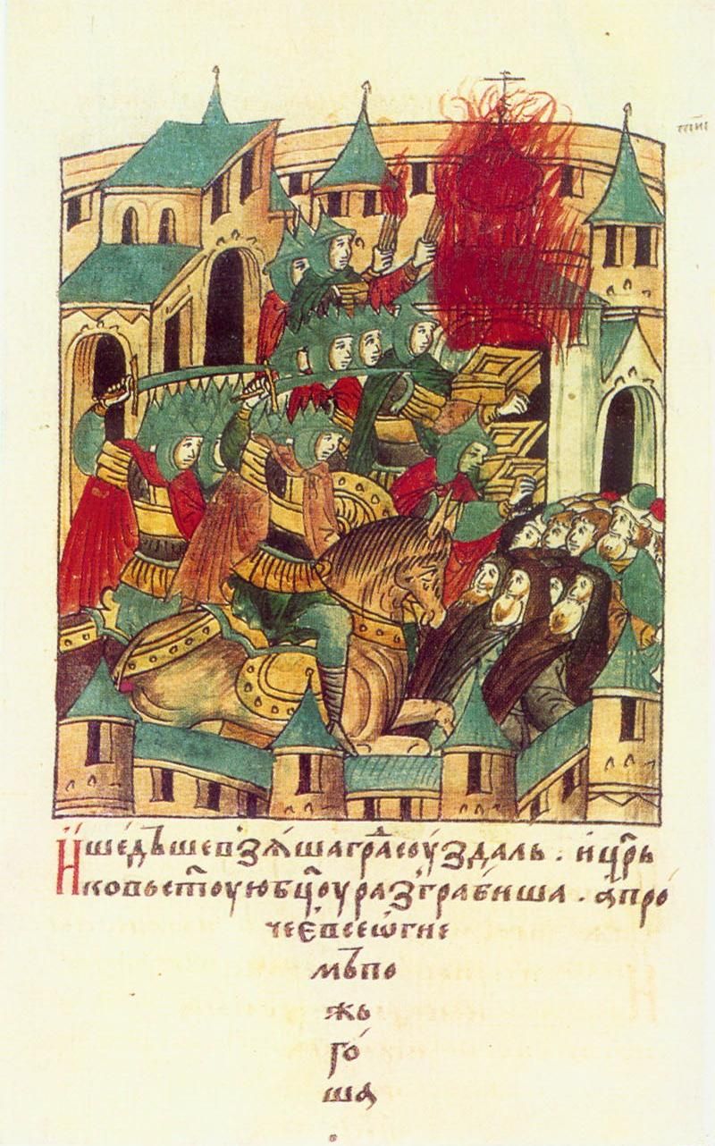 Взятие Суздаля монголами